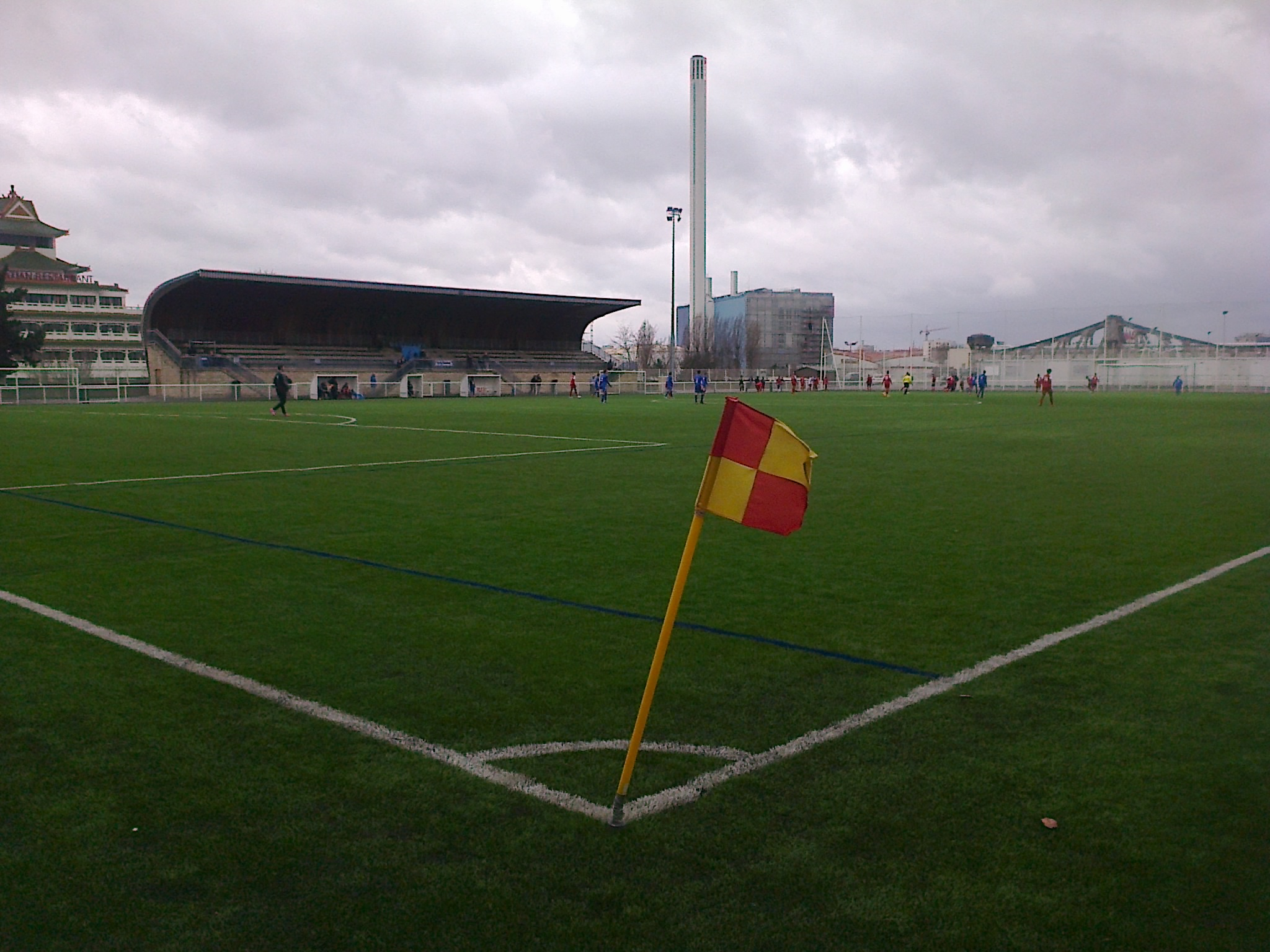 Le stade Henri Guérin de Charenton-le-Pont